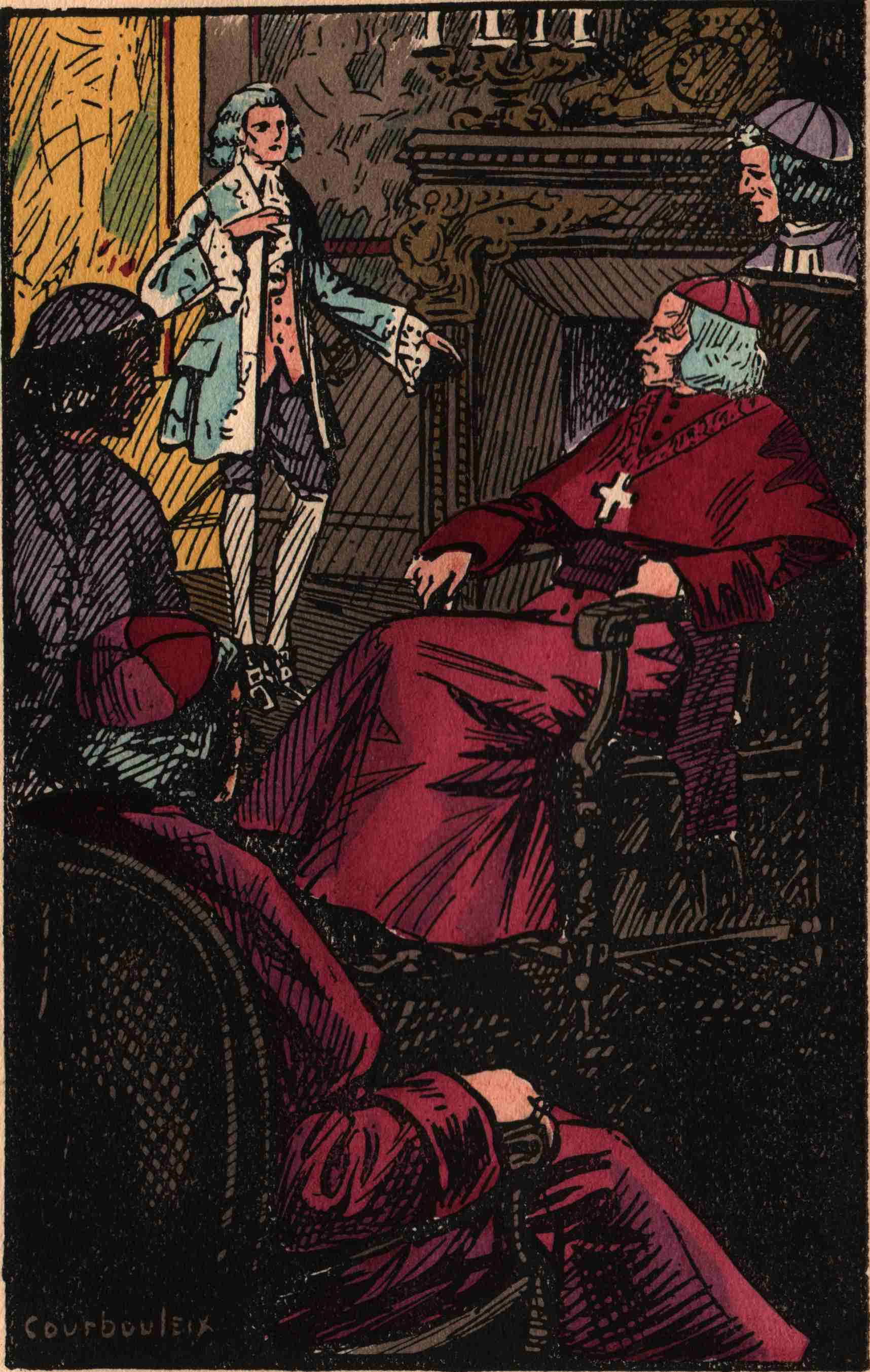 Frontispice par Léon Courbouleix du livre Sarrasine d'Honoré de Balzac, Paris Ve, Maurice Glomeau éditeur, 1922